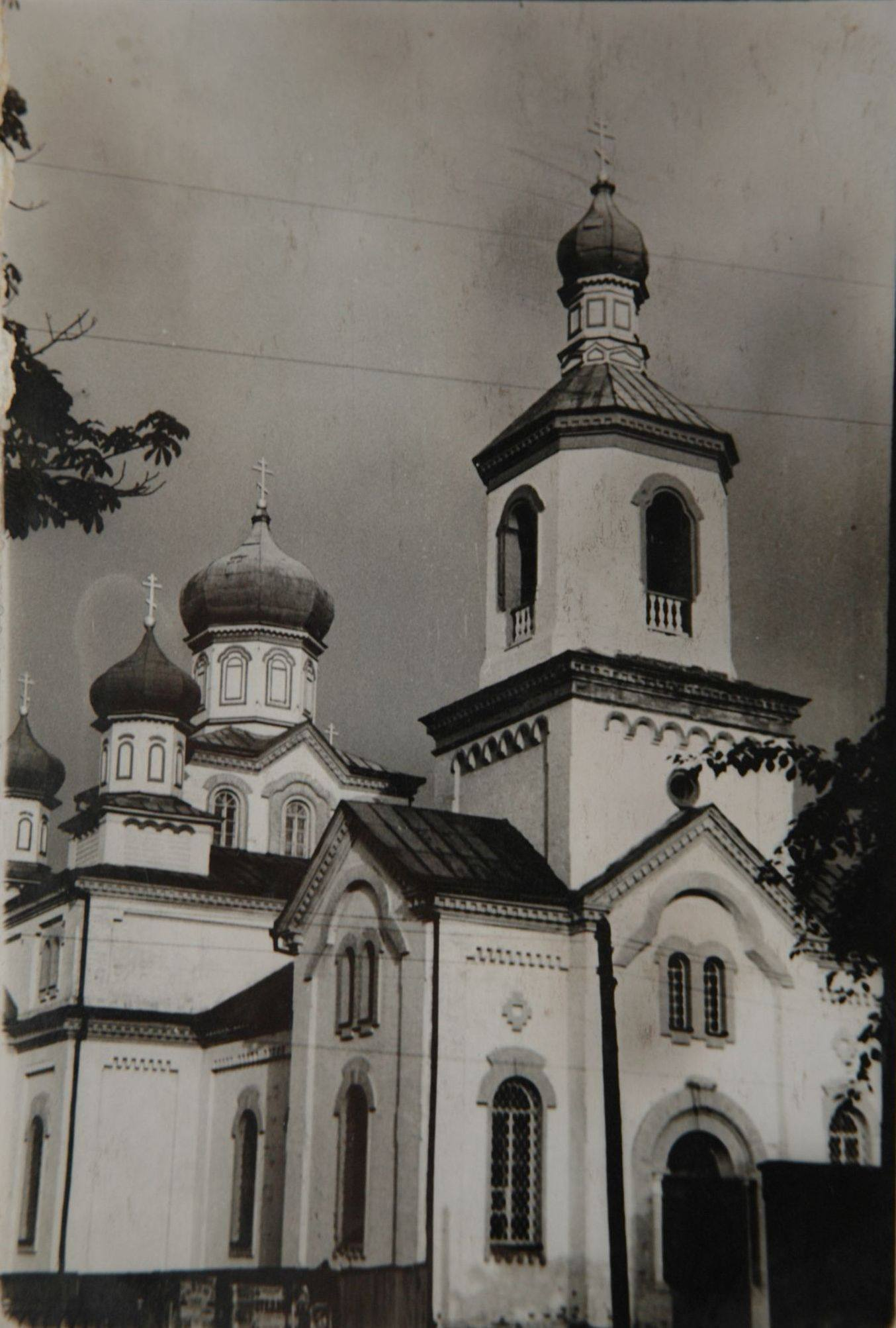 Беларуская (тарашкевіца): Бабруйск (Babrujsk), вуліца Раманаўская (vulica Ramanaŭskaja). Царква Сьвятога Мікалая